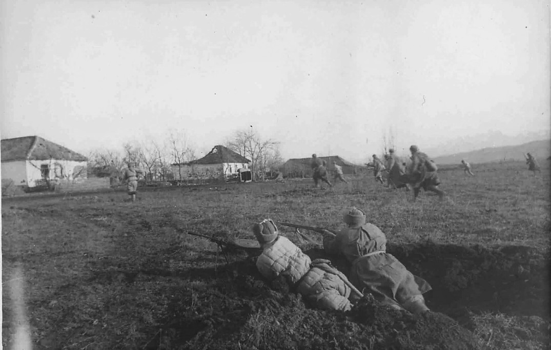 Юго-восточнее Нальчика. На снимке: Гвардейцы подразделения гвардии лейтенанта Г. Аминова, награждённого орденом Красного Знамени, после артподготовки атакуют немцев в населённом пункте М.